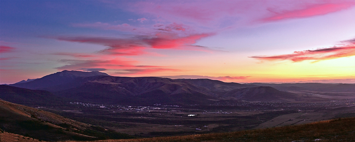 Вид на плато Чатыр-Даг с Демерджи-яйла.